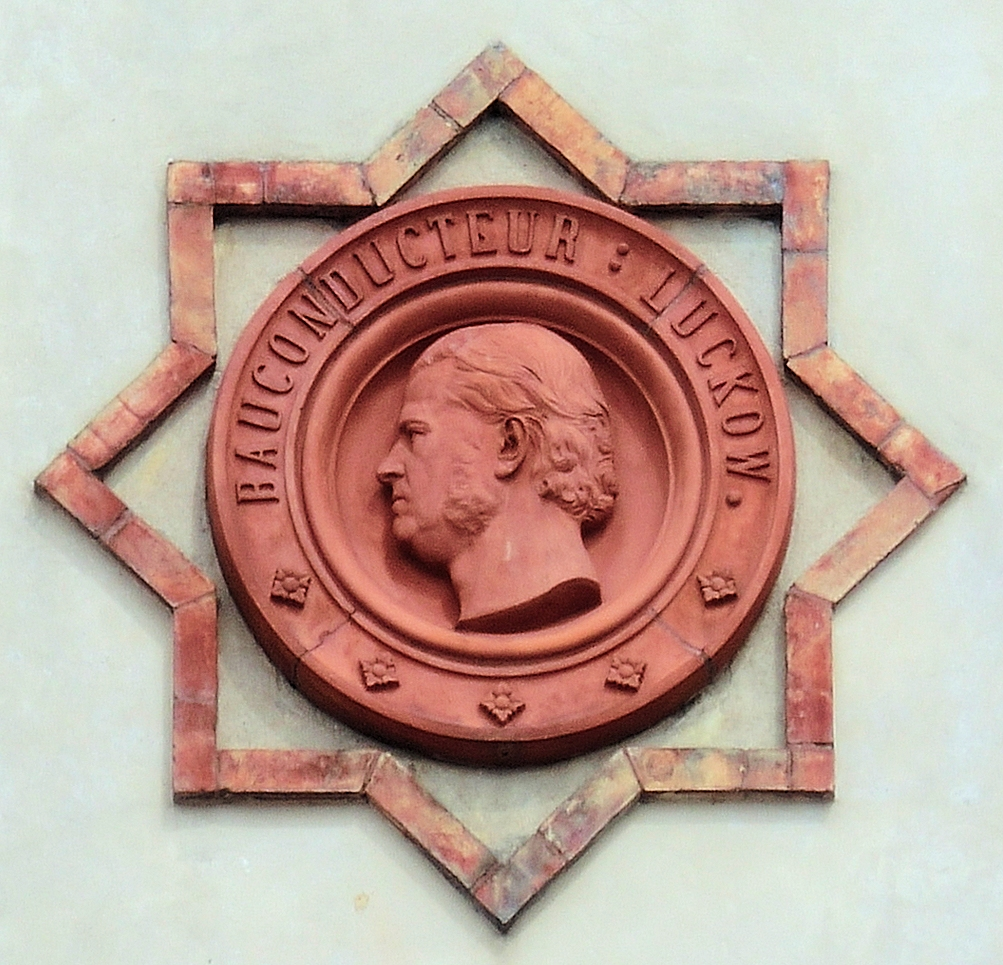 Rostock Universitätshauptgebäude Relief Bauconducteur Luckow